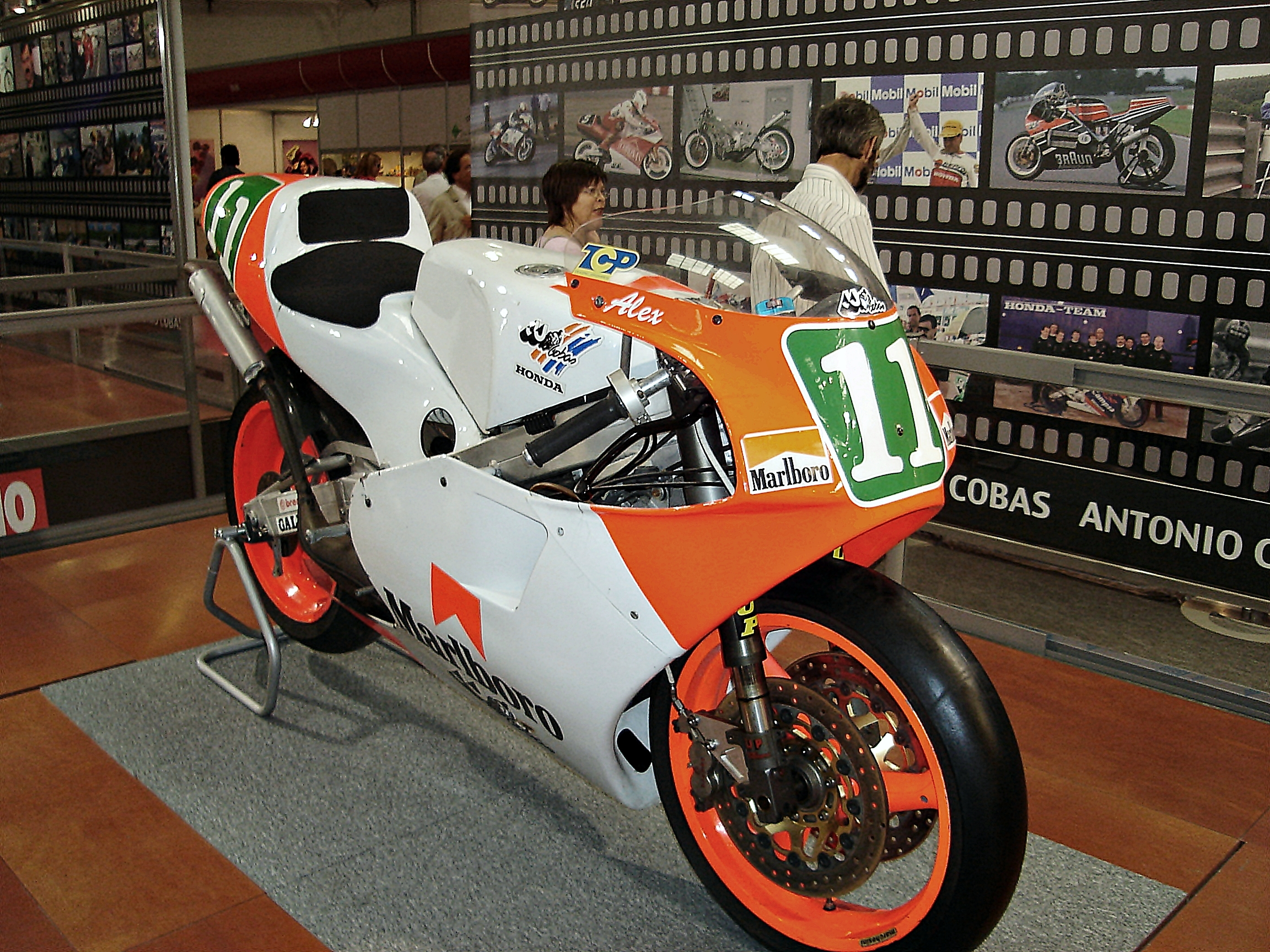 JJ Cobas 250 Alex Criville-salon de Barcelona